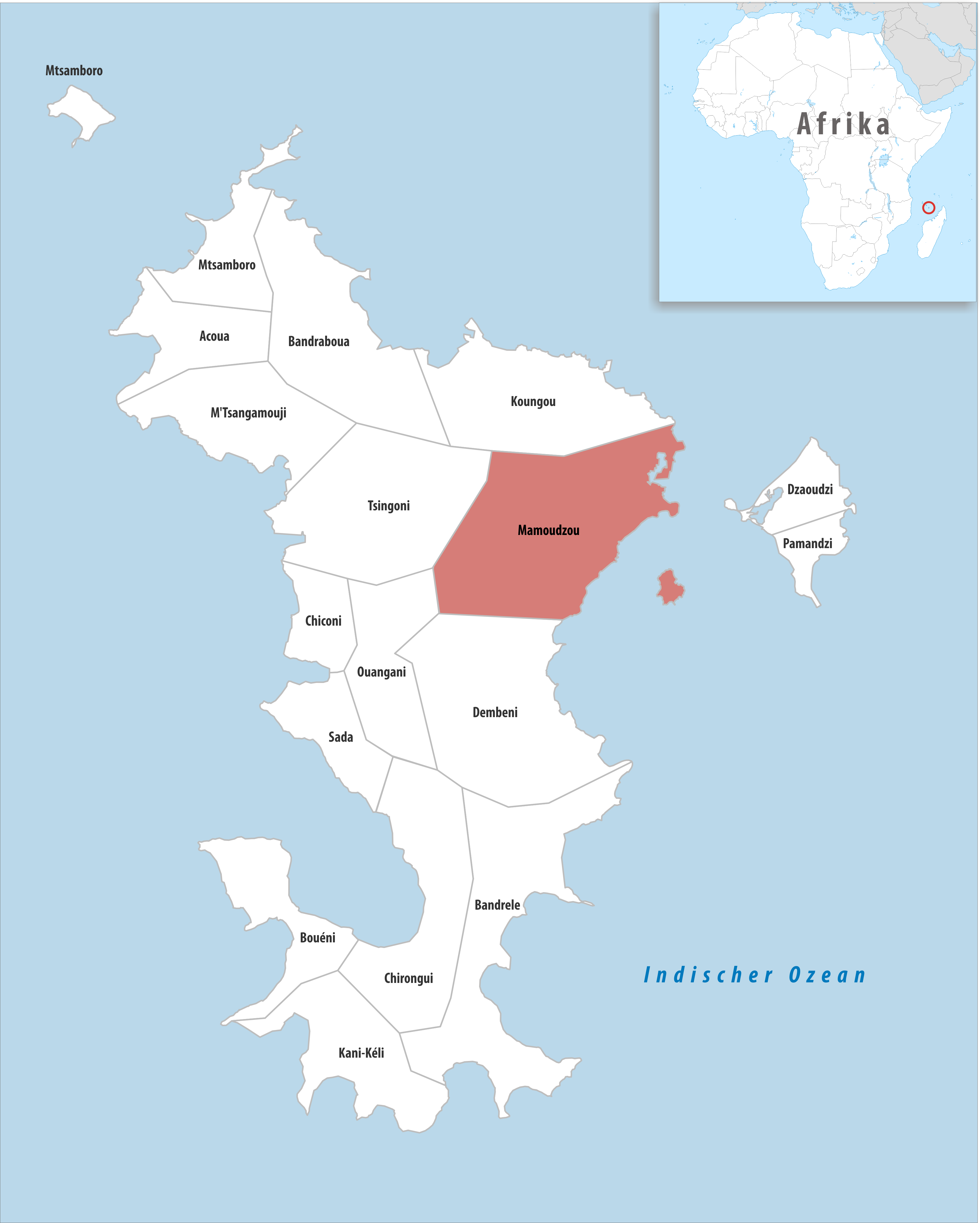 Lage der Gemeinde Mamoudzou